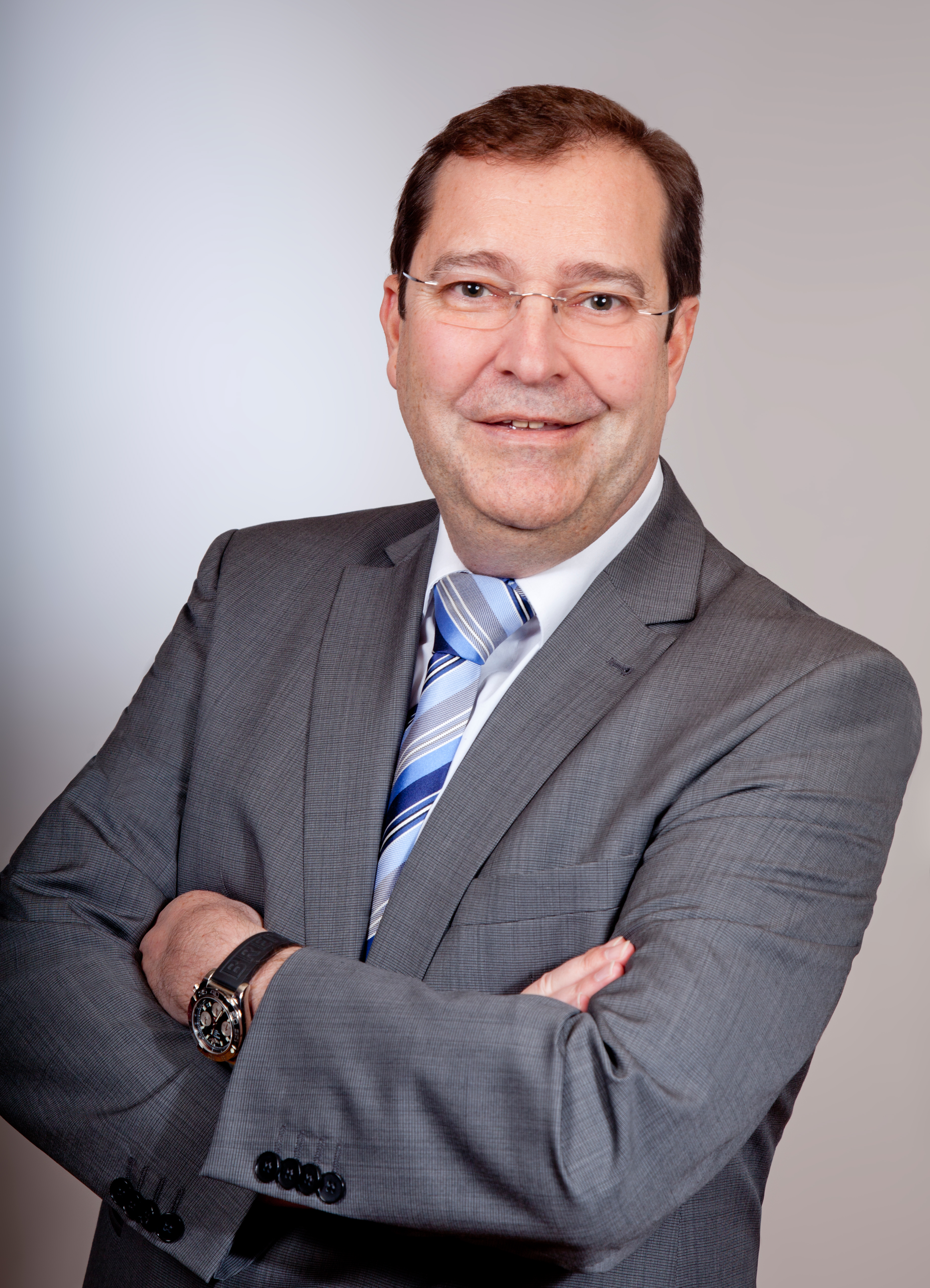 Piet Leidreiter